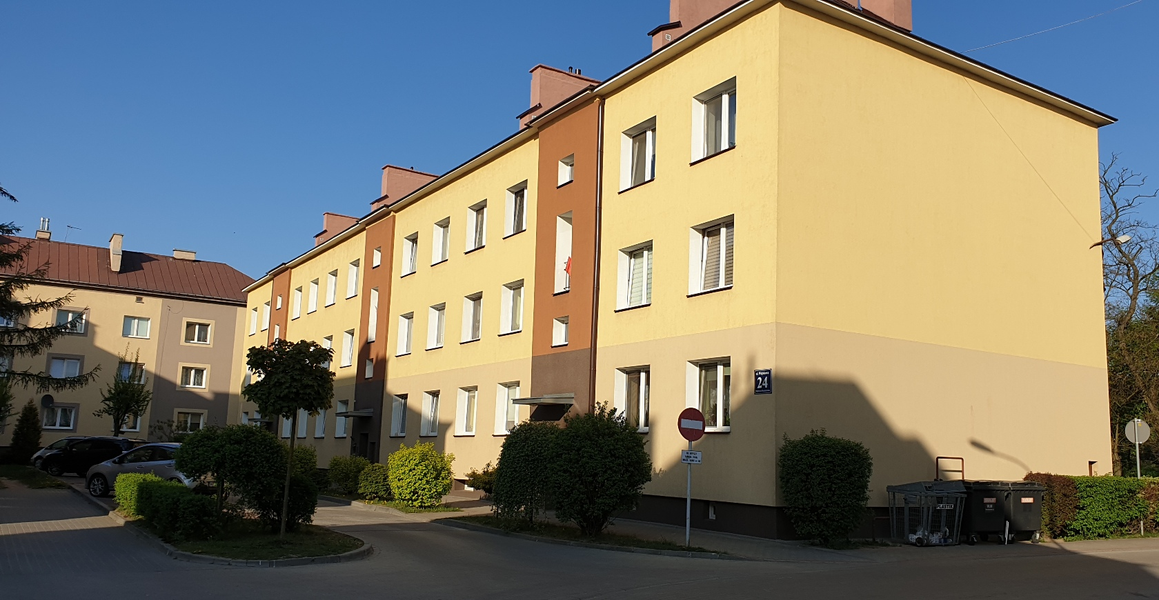 Osiedle wojskowe (2019)